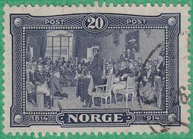 Почтовая марка Норвегии, посвящённая 100-летию заседания стортинга, провозгласившего Норвегию свободной, независимой и неделимой страной